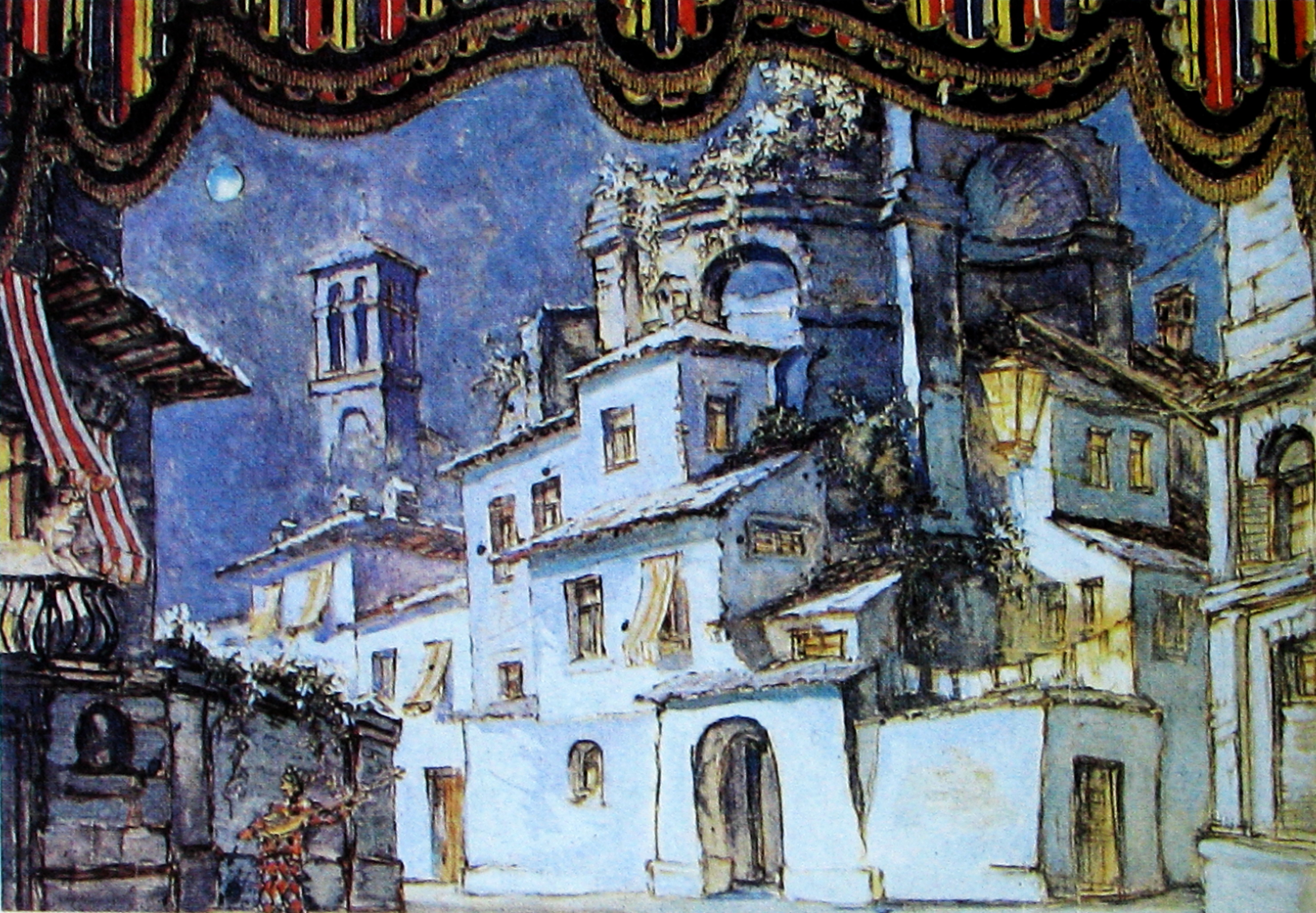 Міхаіл Блішч. Эскіз дэкарацыі да оперы «Севільскі цырульнік»